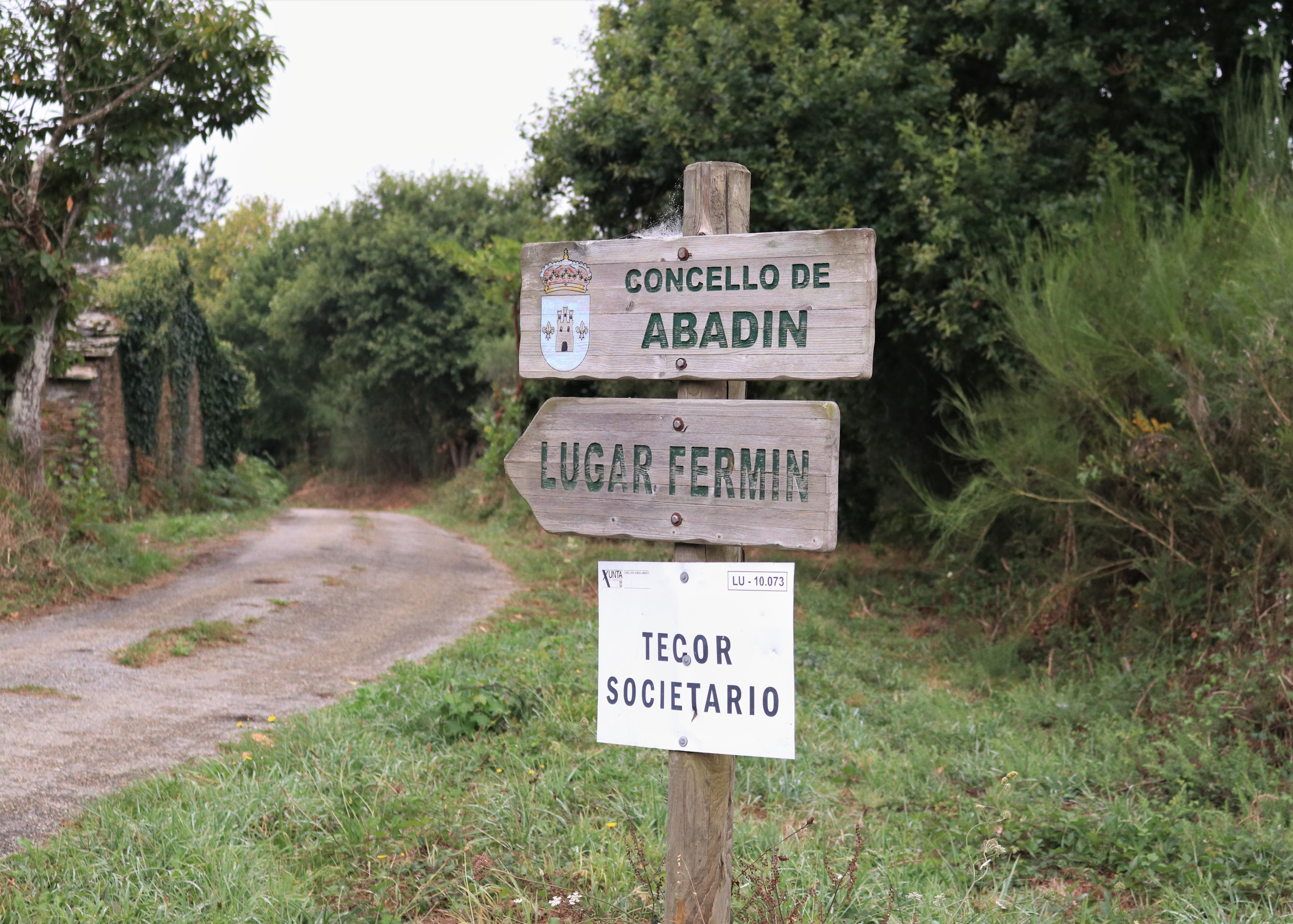 O Fermín, Moncelos, Abadín.